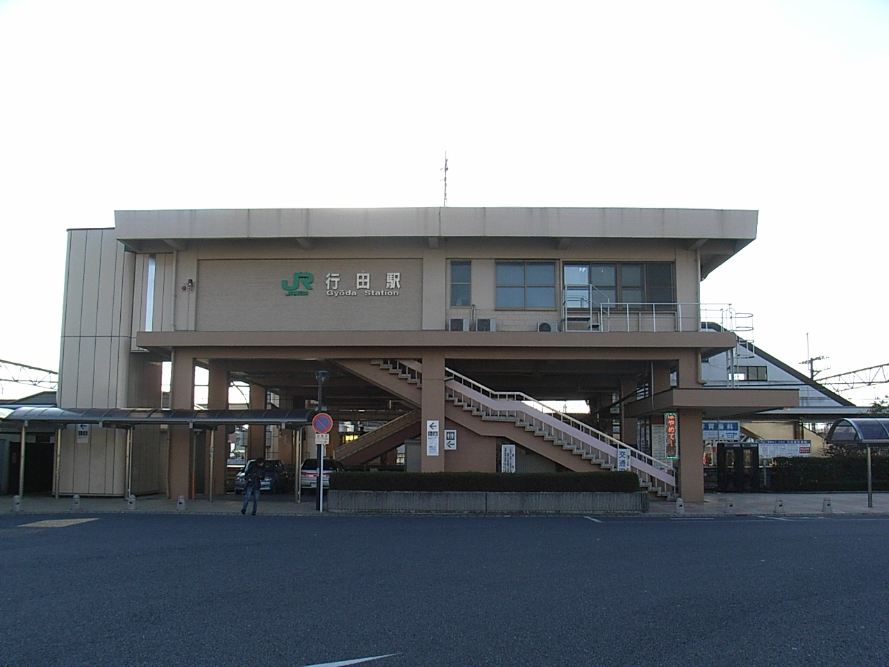 Gyoda Station (East Entrance) on JR Takasaki Line. (12,Ichiriyamacho,Gyoda-shi,Saitama-ken,JAPAN)